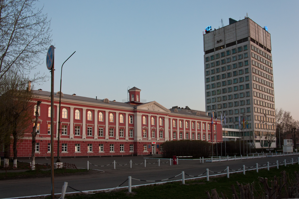 ЧМЗ. Глазов